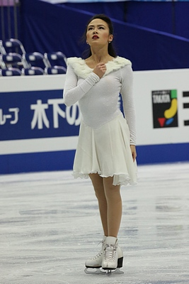 Мэдисон Чок на чемпионате четырёх континентов 2013.